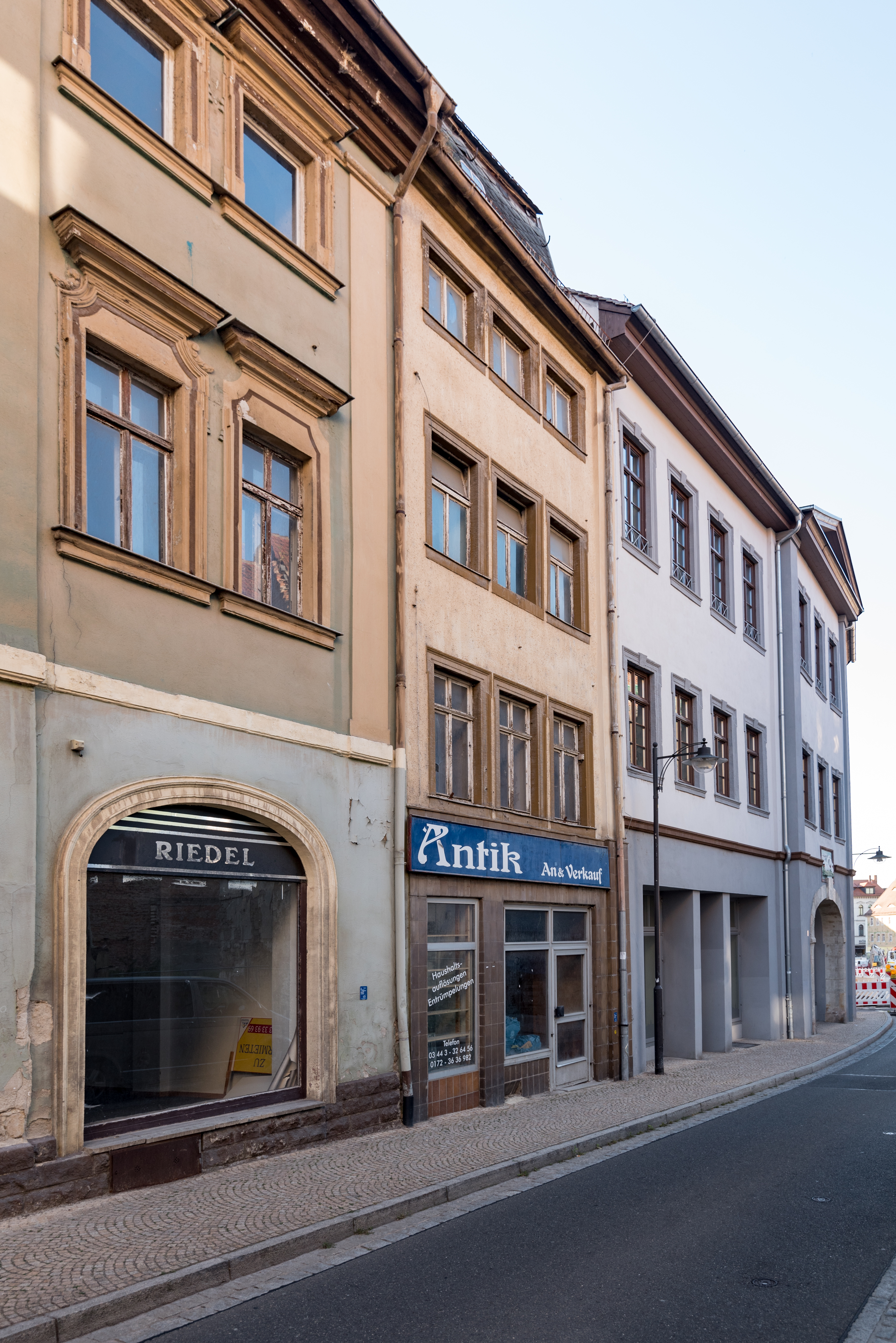 Weißenfels, Große Burgstraße 3